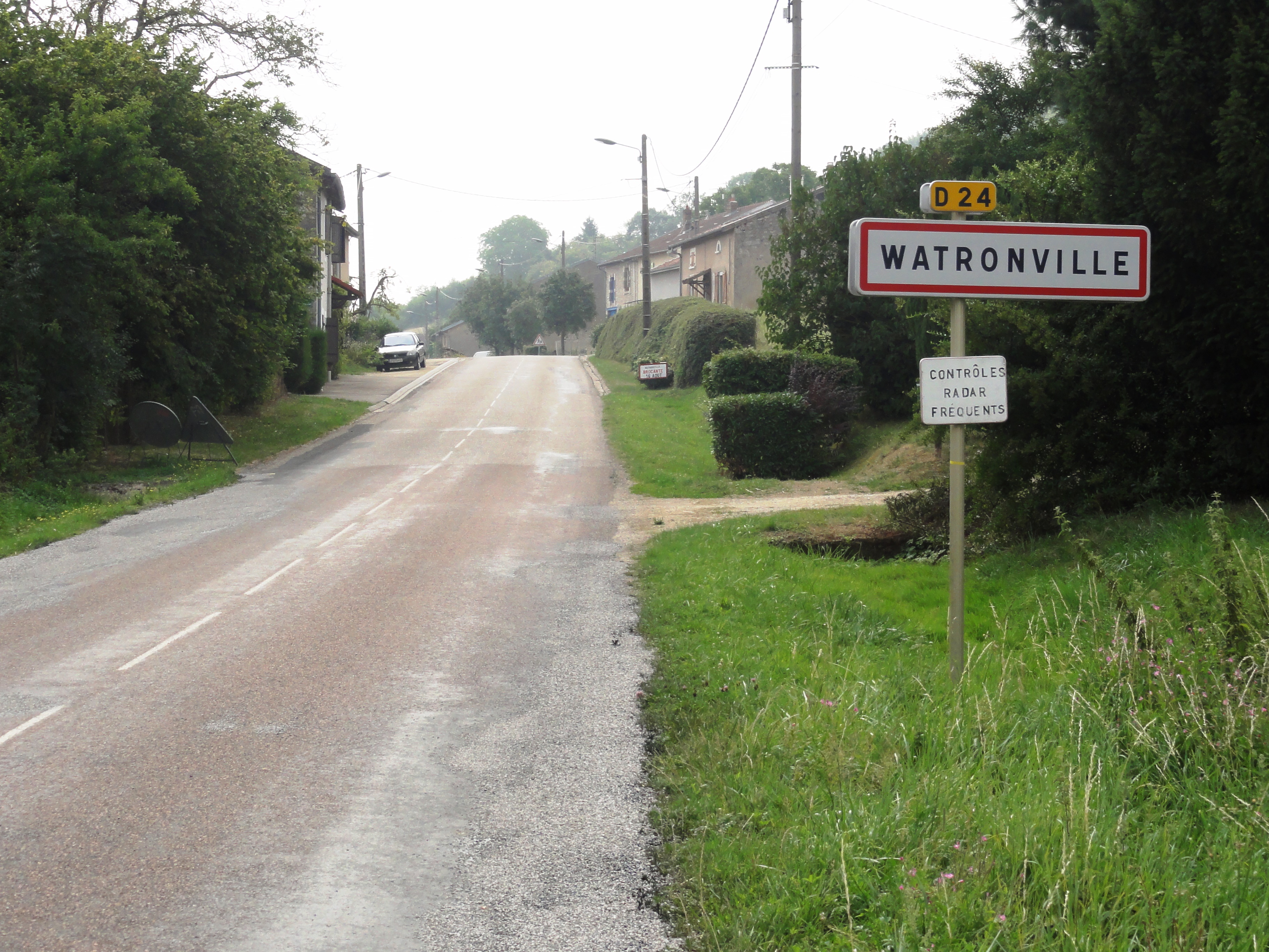 Watronville (Meuse) city limit sign